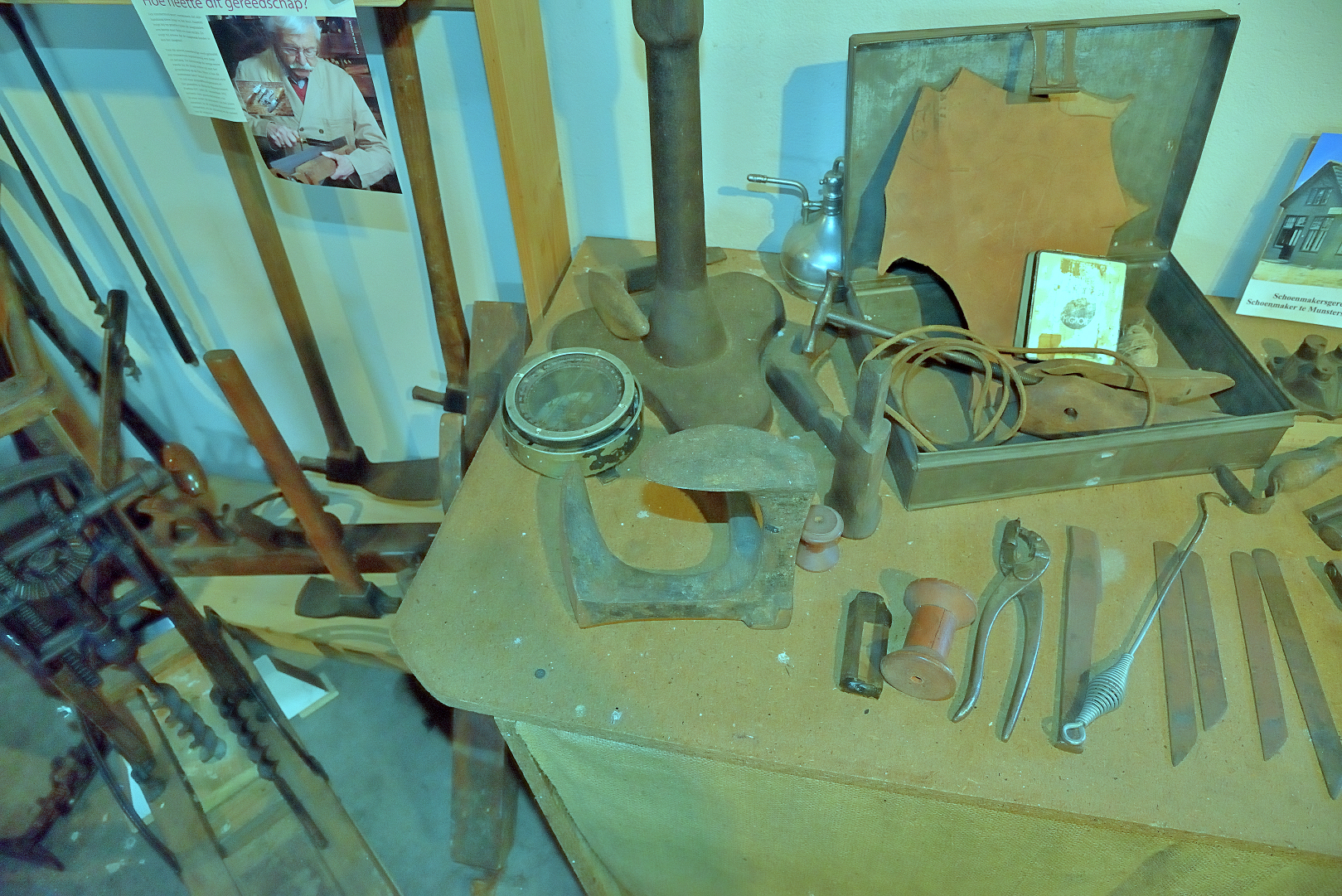 Grenszicht, Emmer Compascuum schoenmakersgereedschap